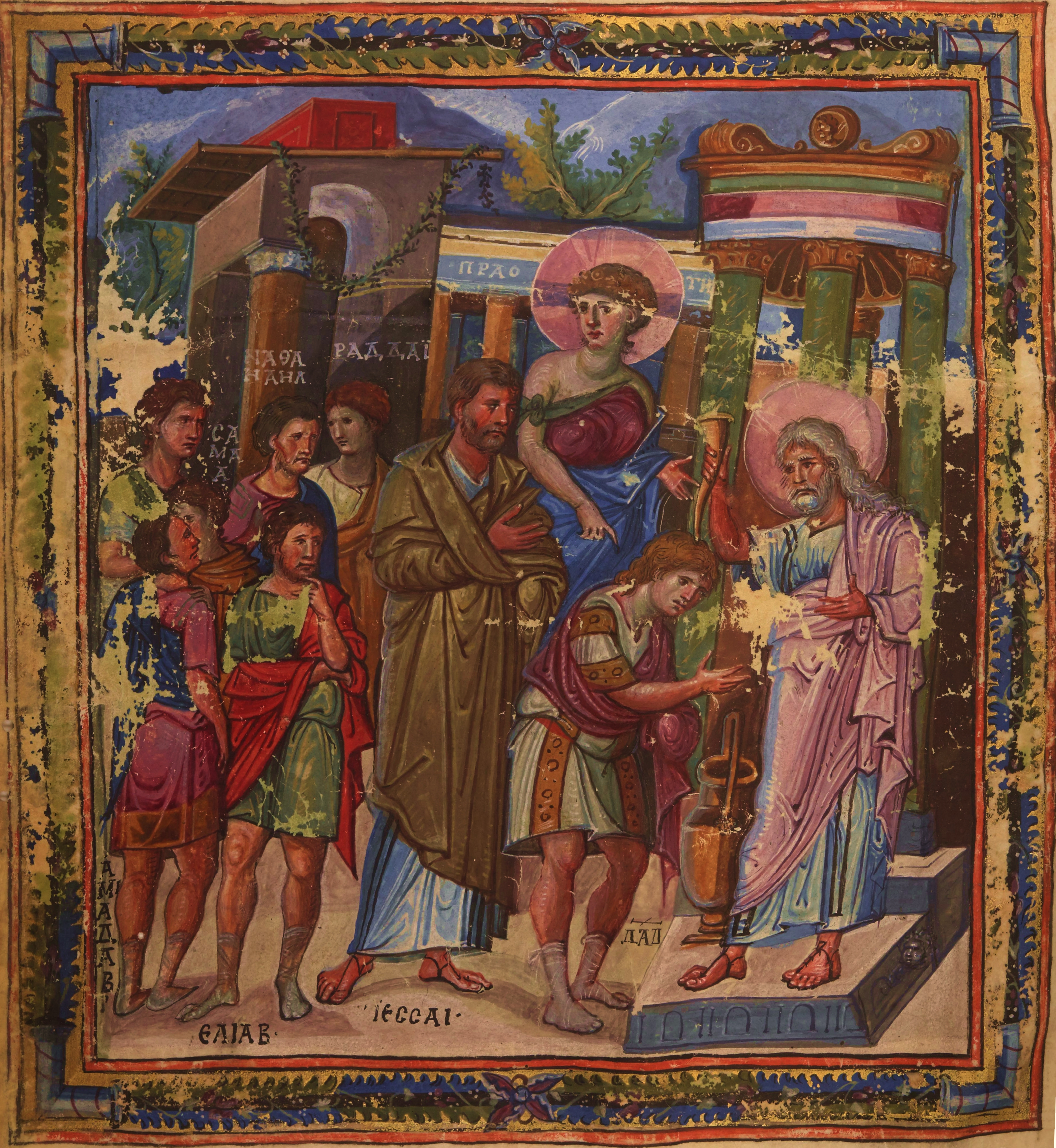 Psautier de Paris, Zalving van David